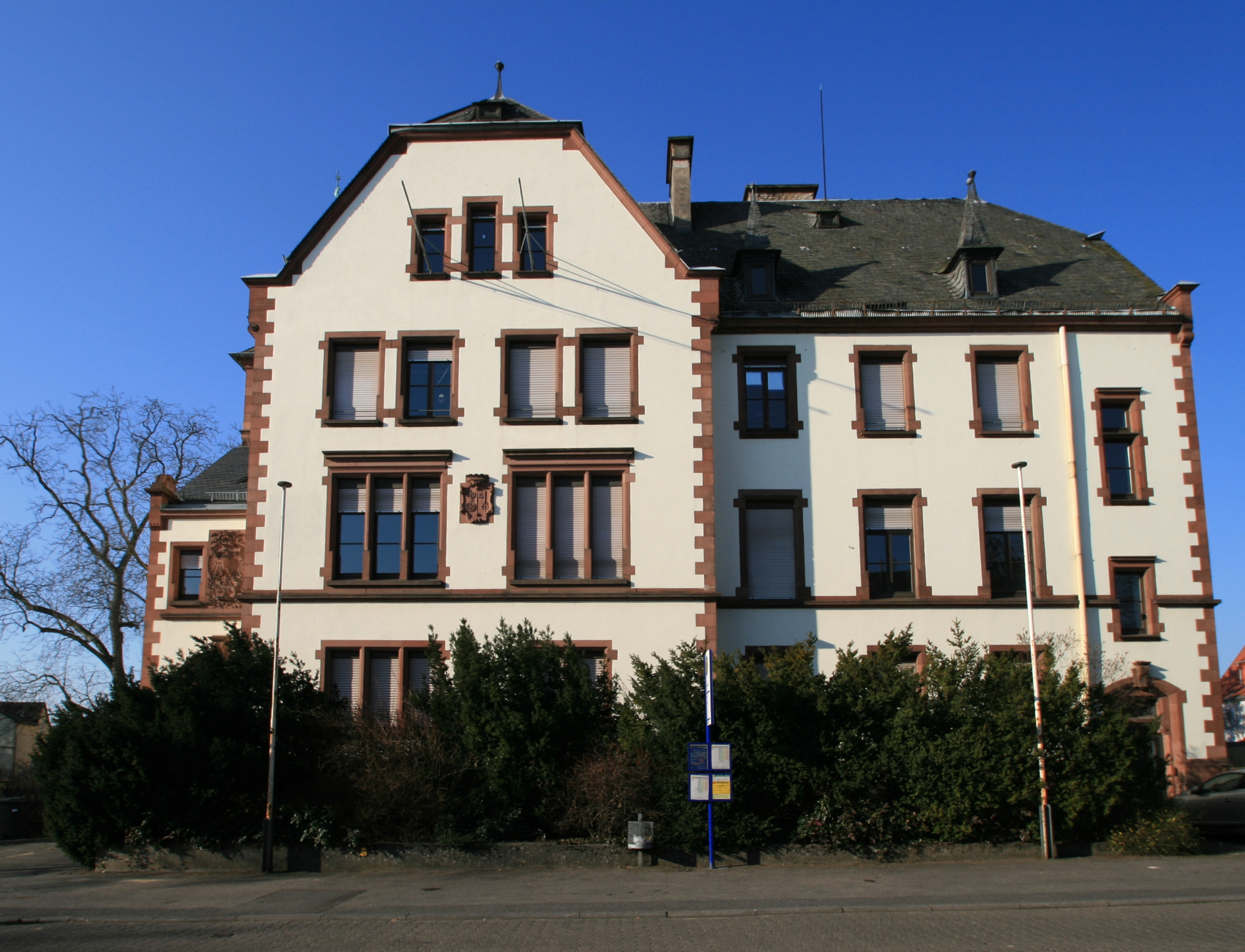 Stadtarchiv, Eltville am Rhein, Rheingau, Hessen. Erbaut 1894. Bis 31.12.2011 war hier die Zweigstelle des Amtgericht Rüdesheim am Rhein untergebracht. Seit Mitte 2012 Nutzung als Stadtarchiv.